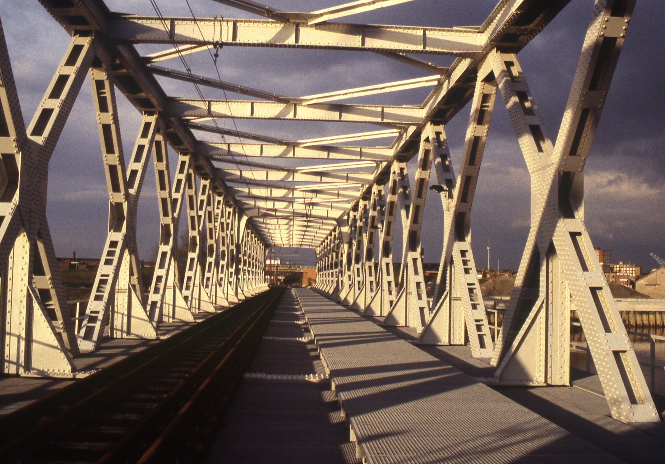 Vernieuwde sporen en nieuw bovenleiding bij de brug over de Rupel en kanaal.